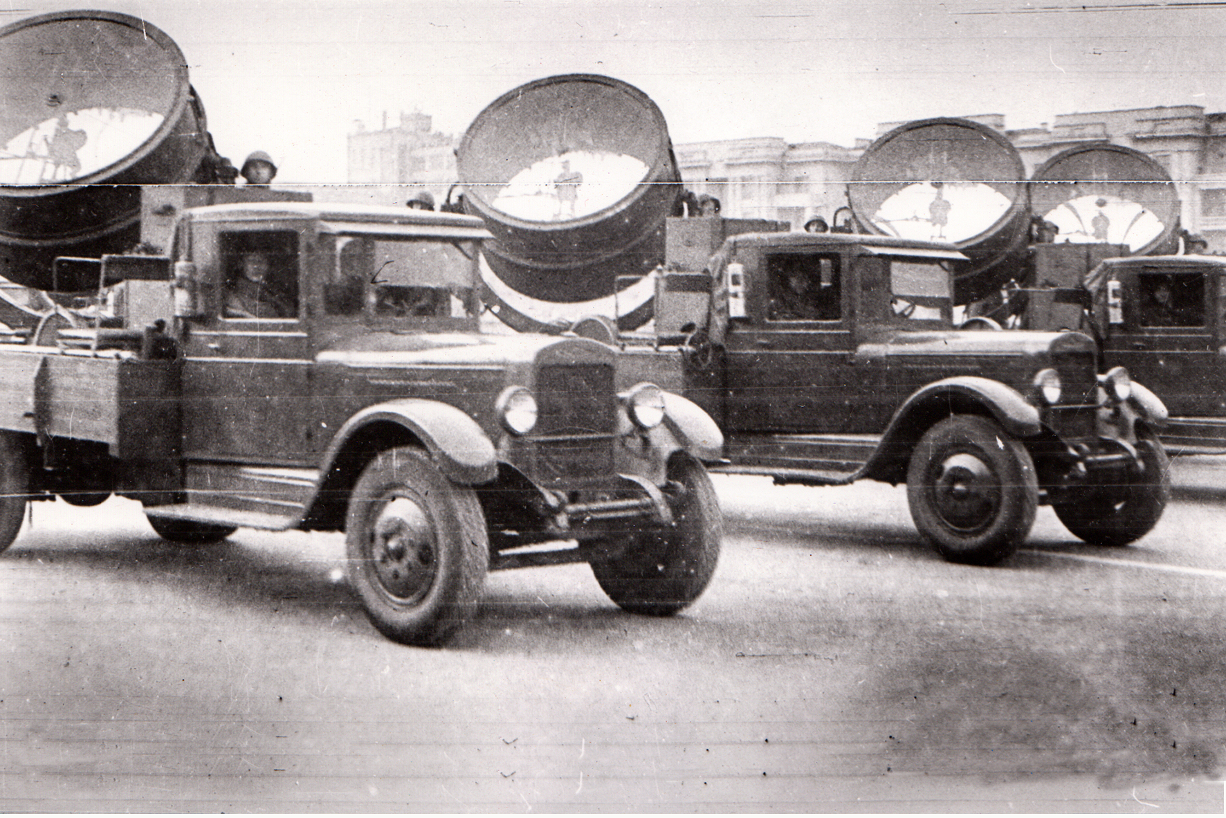 40-й прожекторный полк. Военный парад в Куйбышеве 7 ноября 1941 г.